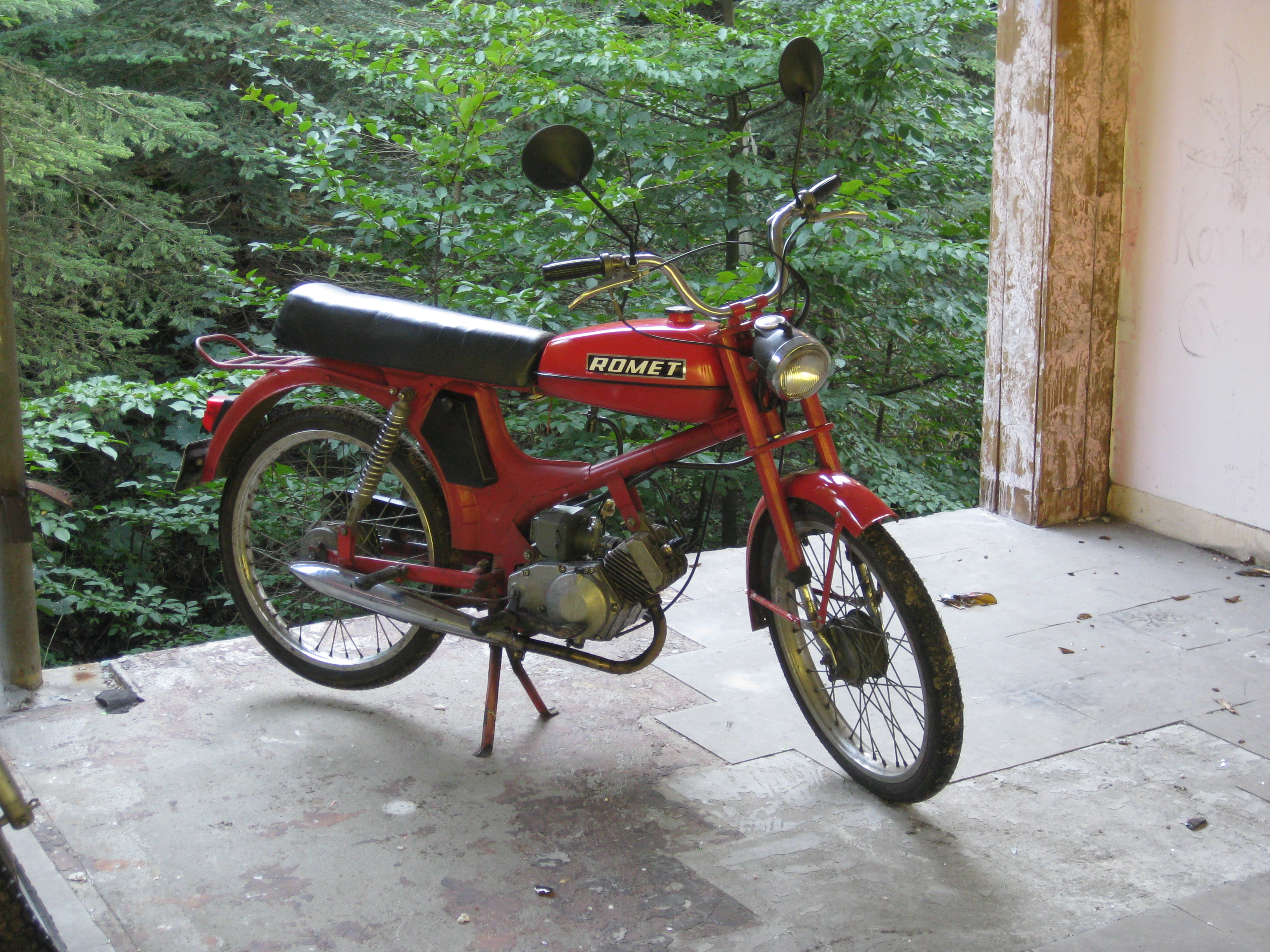 Romet 50-t-1 (dwuosobowy motorower), 1980.